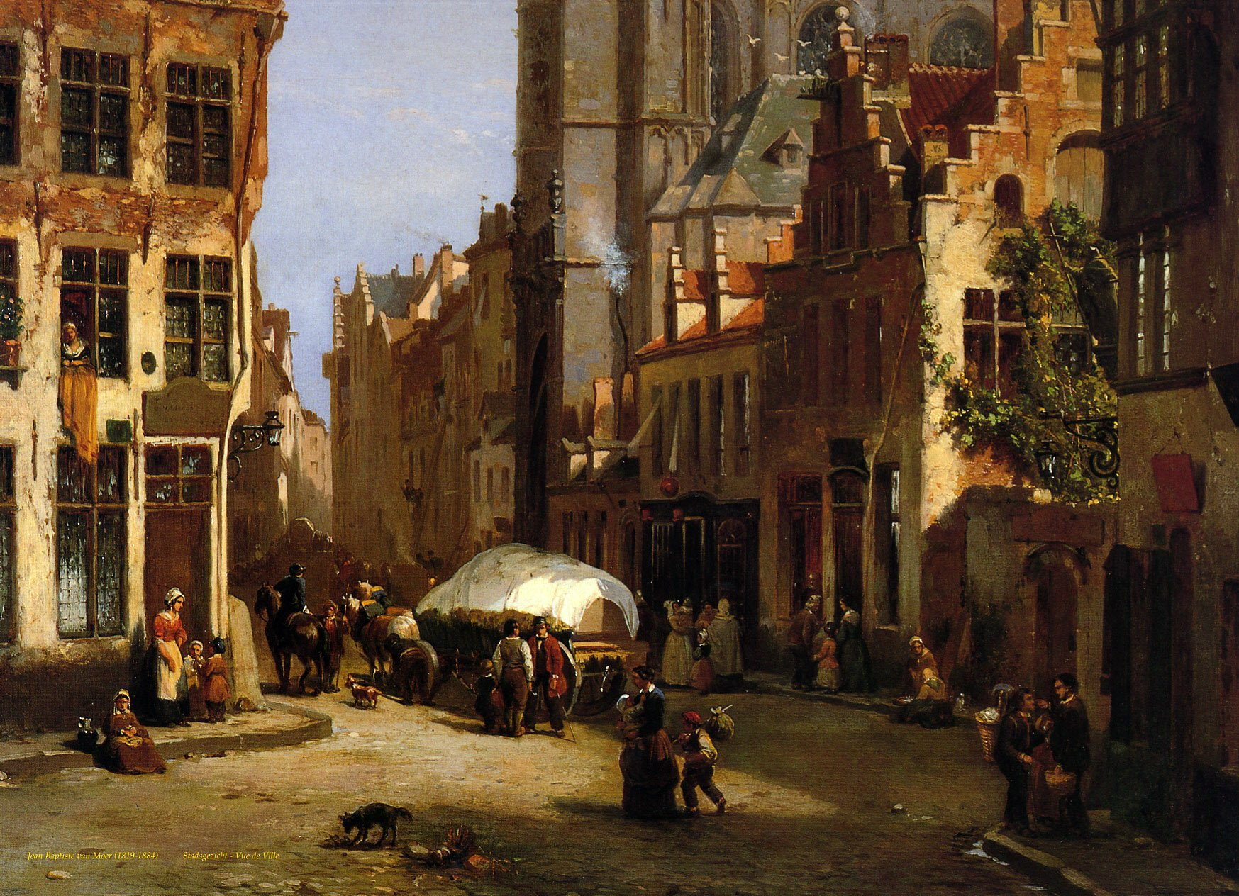 Detail uit Zicht op een Antwerpse kerk, geschilderd door Jean Baptiste Van Moer